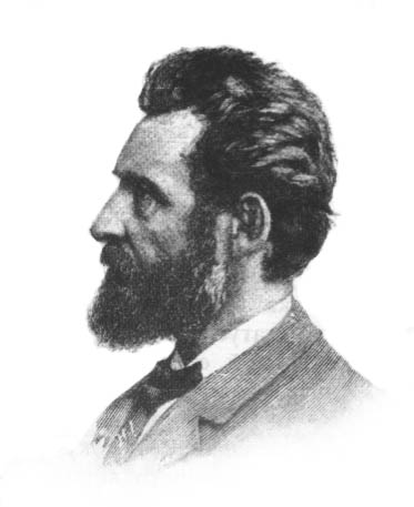 Леонард Марконі 1835-1899